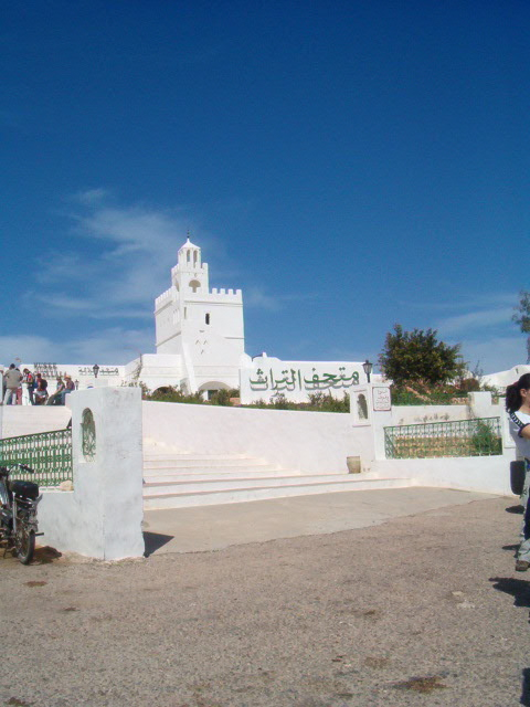 Musée de Guellala (Djerba) en avril 2007